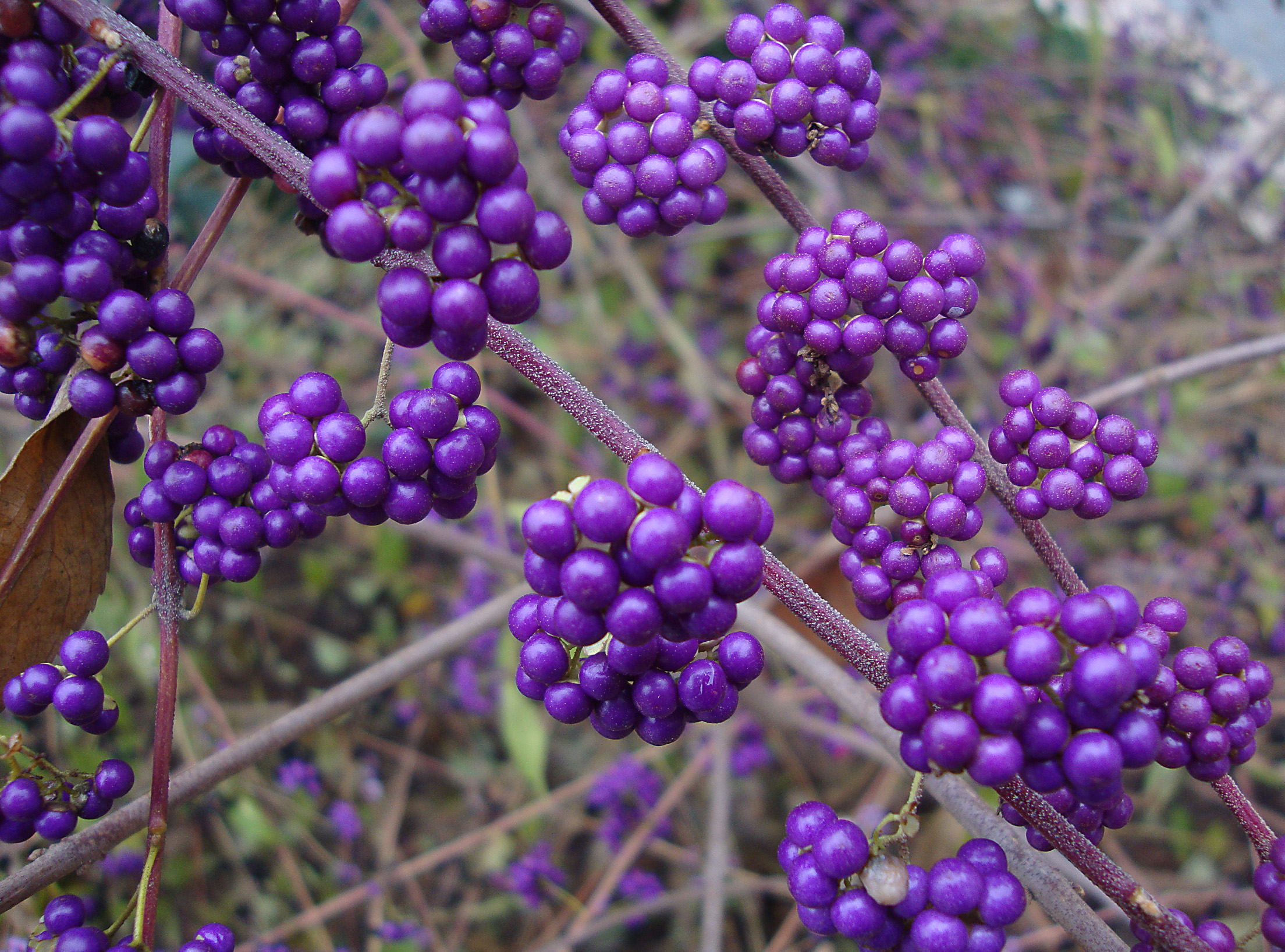 Shikokiana Purple Beautyberry Callicarpa Shikokiana Fam. Verbenaceae